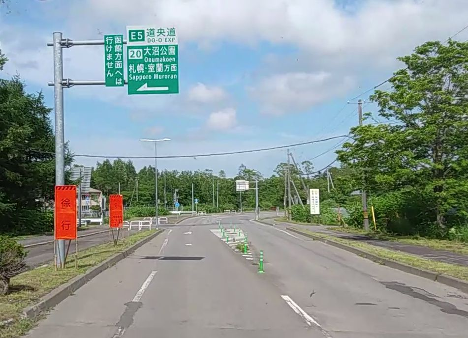 英文表記が“DO-O EXP”となっている道央自動車道の案内標識（大沼公園IC）